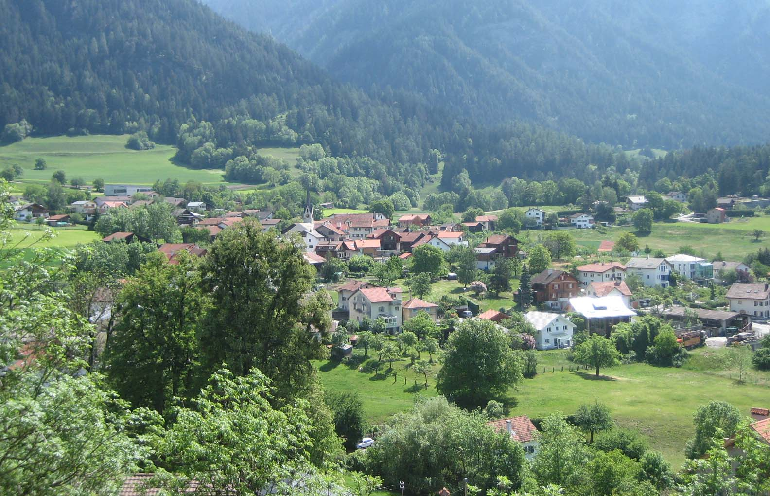 Paspels